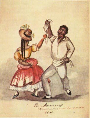 Acuarela de Pancho Fierro (Lima, 1807 - Lima, 1879)